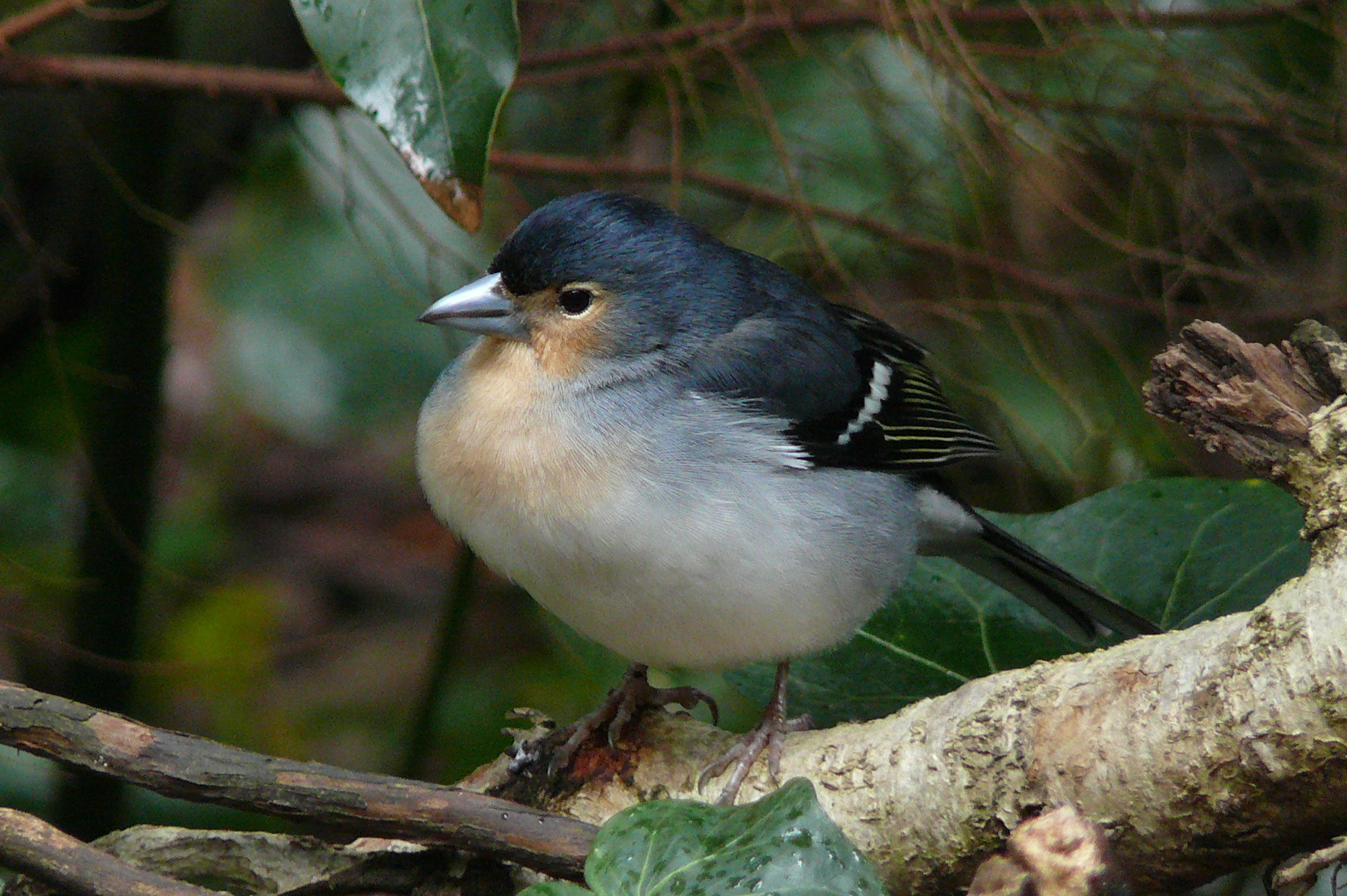 Buchfink (Fringilla coelebs palmae), Unterart auf La Palma